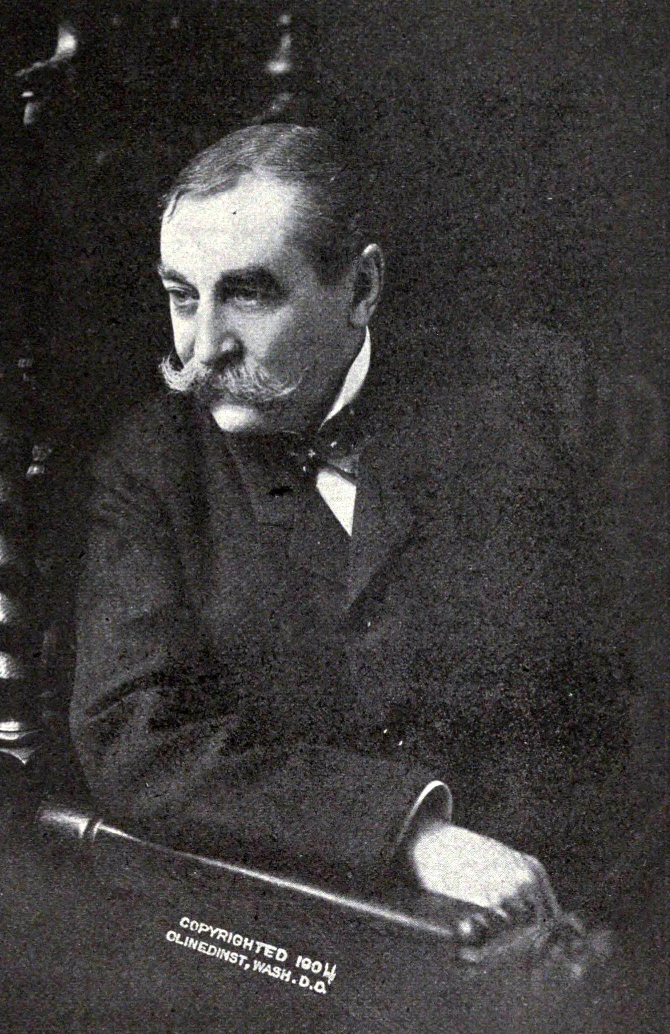 John Dalzell